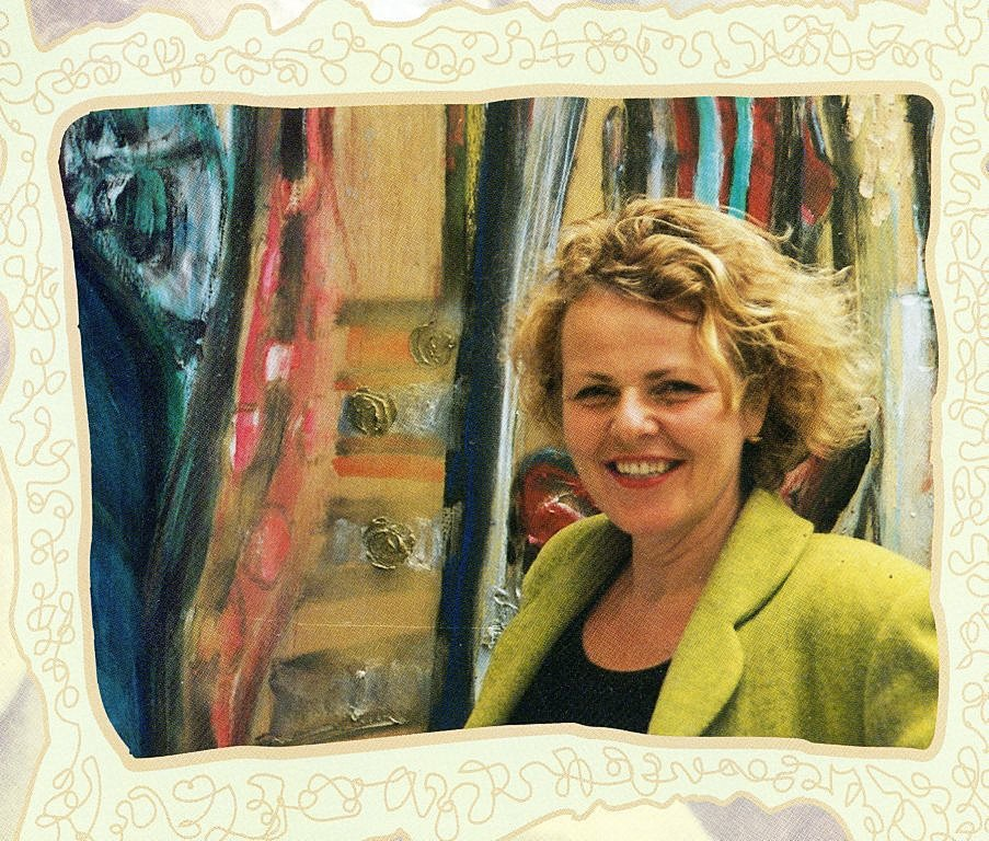 Renate Vincken kunstenares Deventer